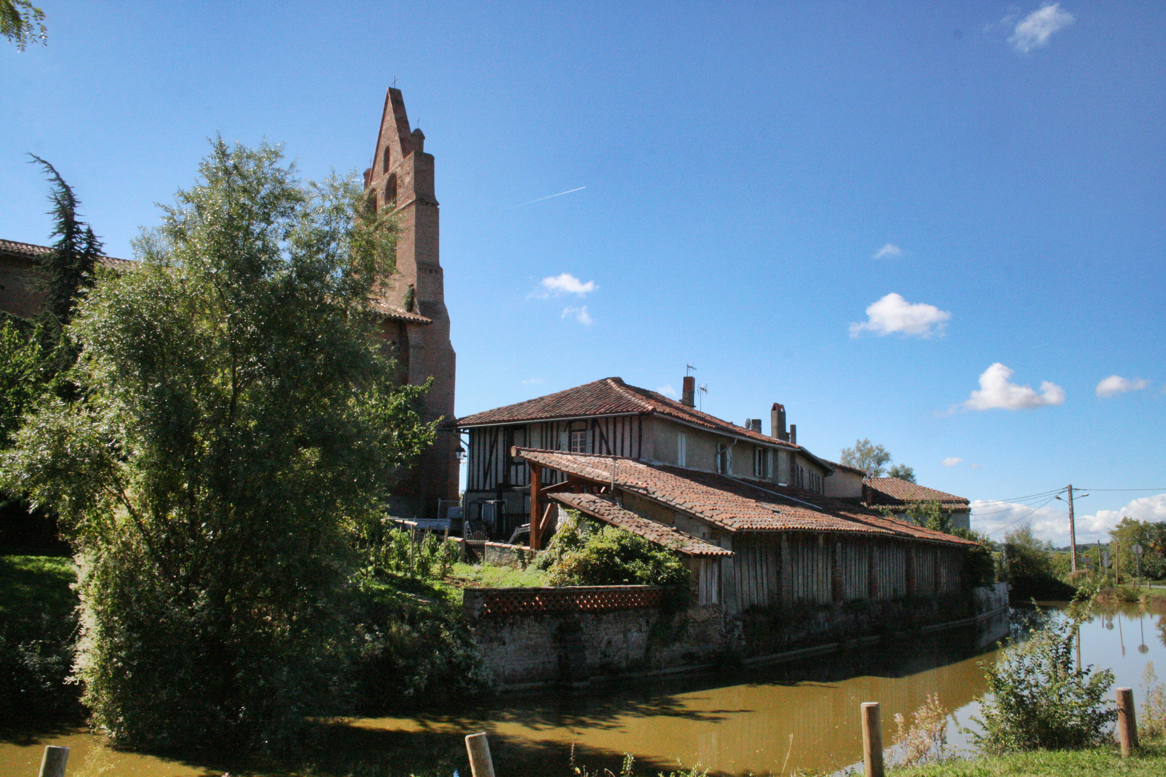 Douve de la commune de Sabonnères en Haute Garonne